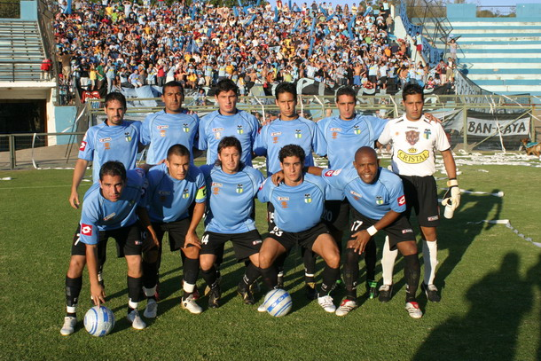 EVE v O'HI